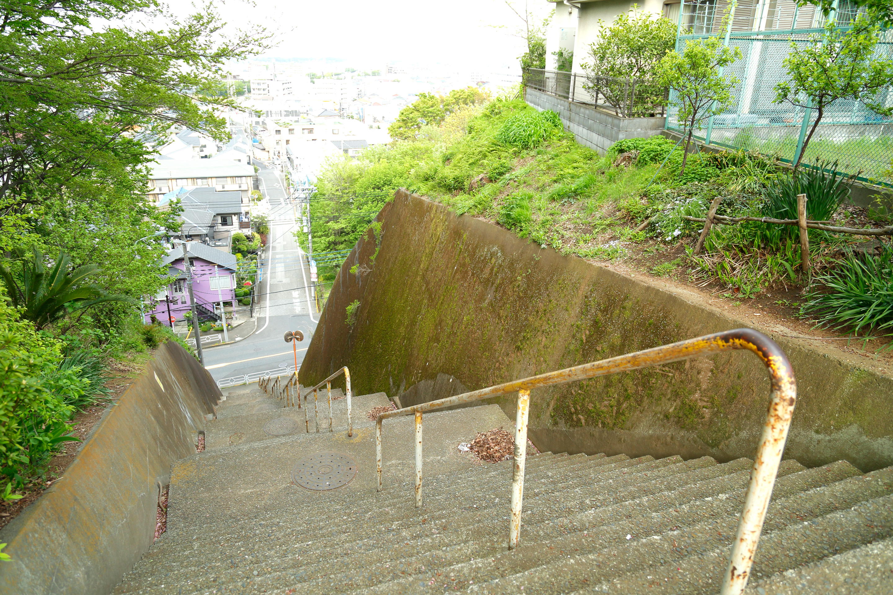 日野市神明にある大階段。